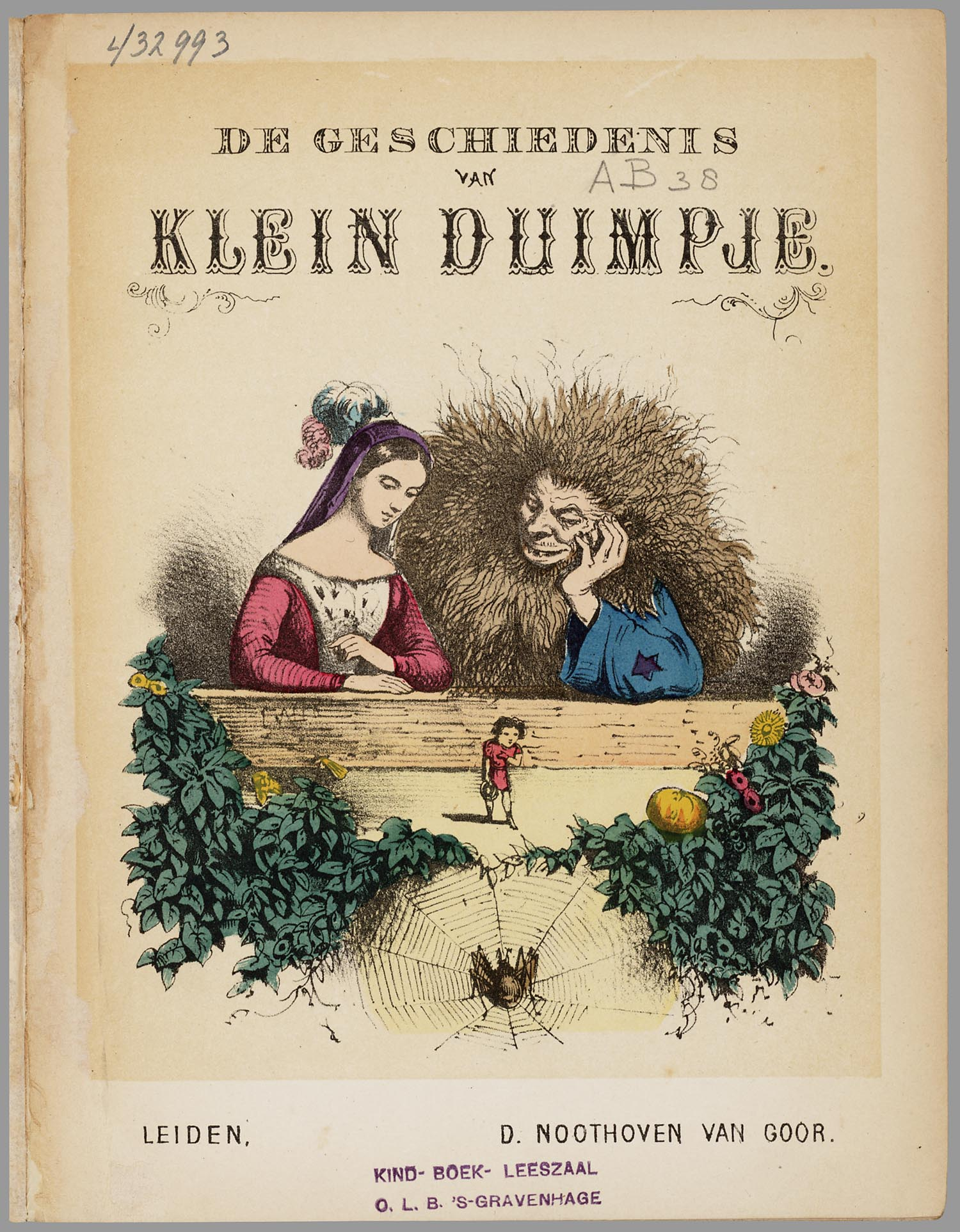 Prentenboek met 8 paginagrote handgekleurde litho's waarop meerdere scènes per blad staan. In rijmvorm wordt verteld hoe tovenaar Merlijn er voor zorgt dat de ouders van Klein Duimpje, die in Engeland wonen, een heel klein jongetje krijgen. Hij groeit op, leert schrijven en tekenen, verdedigt zich tegen voor hem enorme insecten, valt in een pot met beslag, wordt door een vis opgeslokt, belandt aan het hof en komt weer veilig thuis. 10 p., 8 bl. pl : handgekl. lith // De keerzijde der illustraties is onbedrukt // Bewerking van het Engelse volksverhaal over 'Tom Thumb' // Ingekleurd : f 0,75 Volkssprookjes // Prentenboeken // Rijmvertellingen